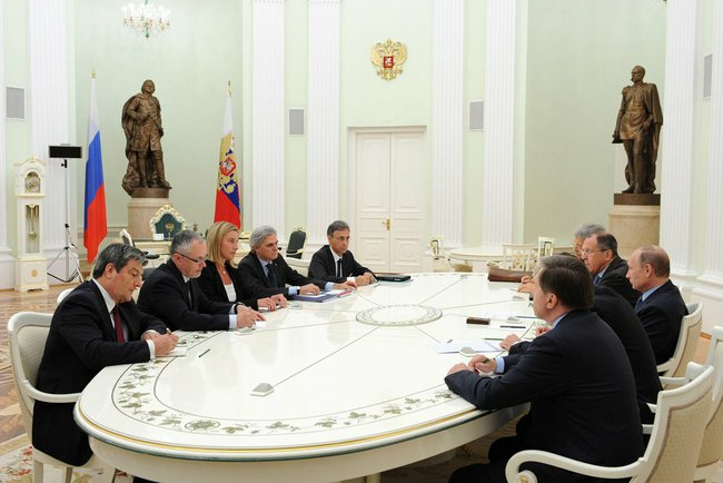 Встреча с Министром иностранных дел Италии Федерикой Могерини